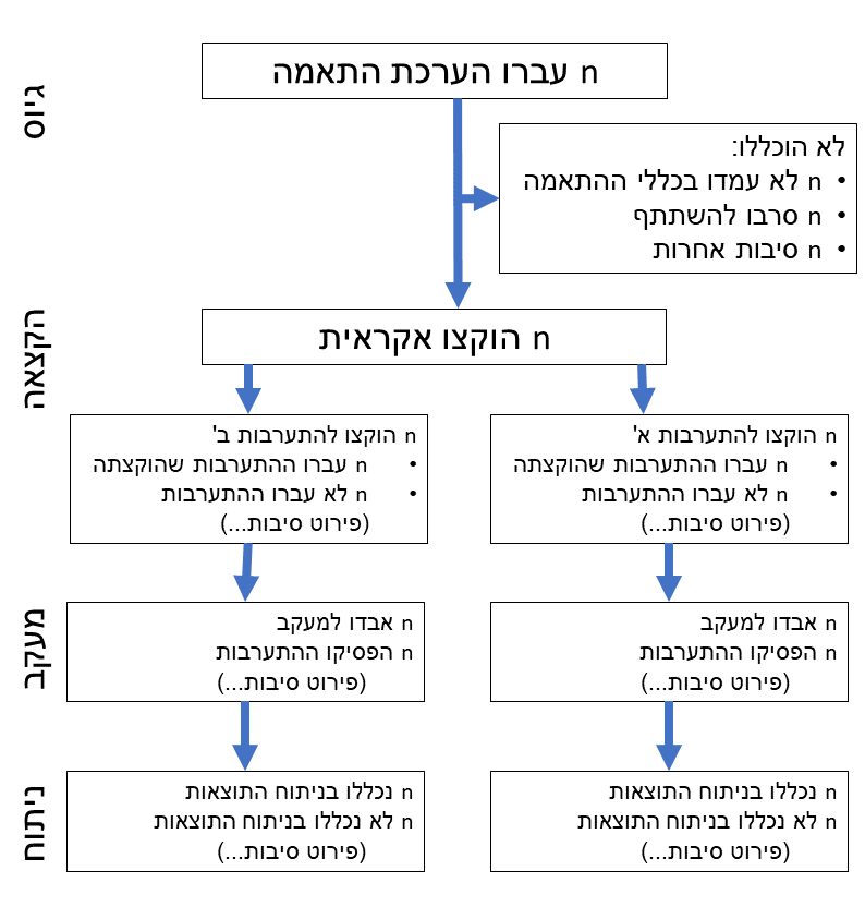 תבנית תקנית לתיאור שלבי מחקר מבוקר עם הקצאה אקראית לשתי קבוצות במקביל. מתורגם עברית, לפי הצהרת CONSORT (תקן מוסכם לדיווח על מחקרי רנדומיזציה) מ-2010